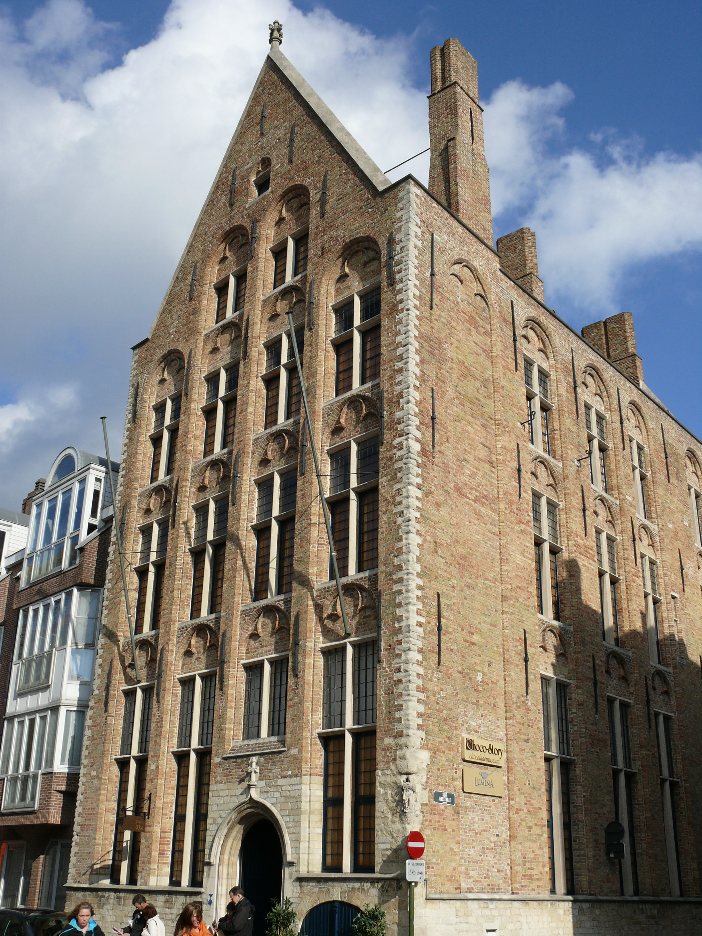 Het historisch pand "De Croon", gelegen aan het Sint-Jansplein, bevat het Lampenmuseum en The Chocolate Museum